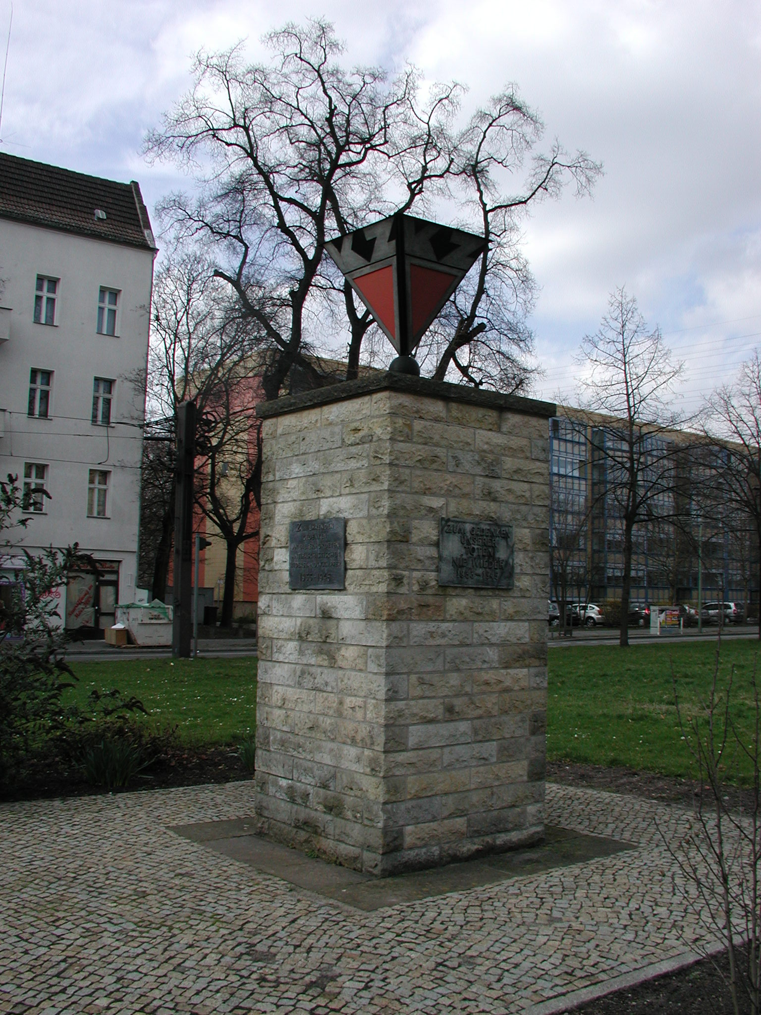 Loeperplatz, Denkmal für die Antifaschisten (2)